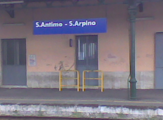 Foto della stazione di Sant'Antimo-Sant'Arpino